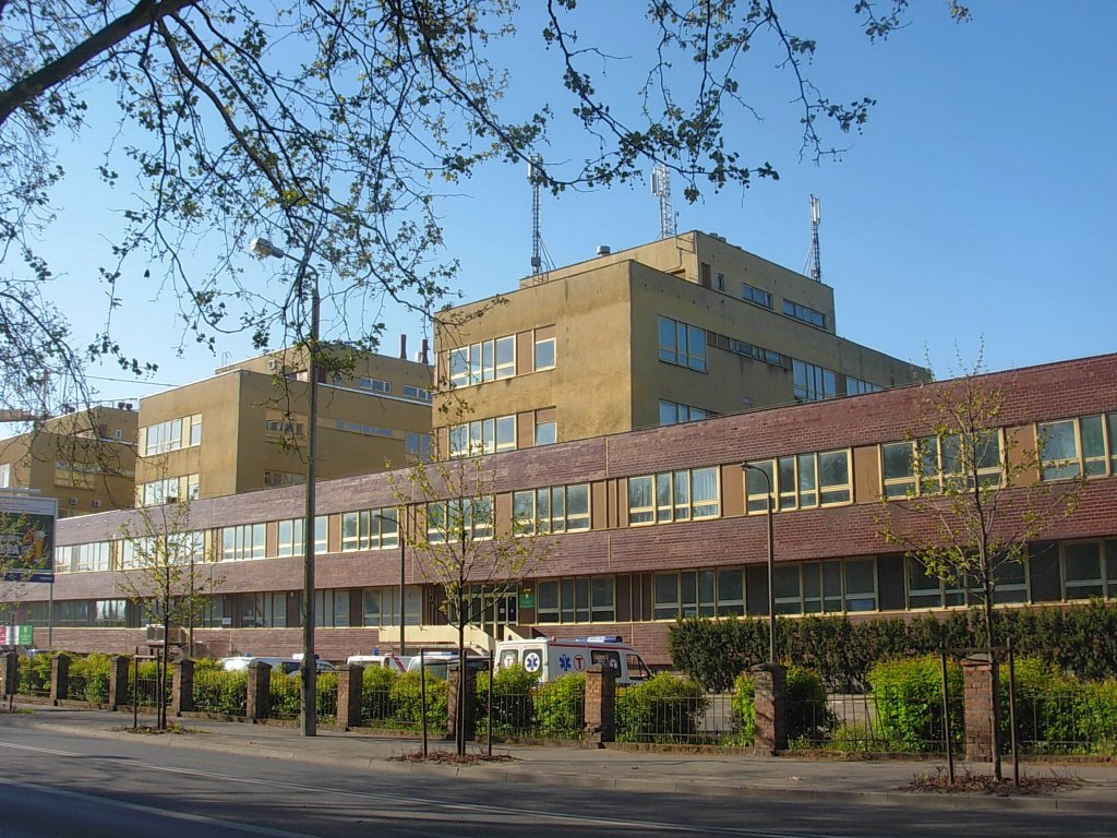 Instytuty Rolnicze w Bydgoszczy, ul. Powstańców Wielkopolskich 10, Inspekcja Weterynaryjna, Wojewódzki Inspektorat Weterynarii, Instytut Hodowli i Aklimatyzacji Roślin Państwowy Instytut Badawczy w Radzikowie oddział w Bydgoszczy